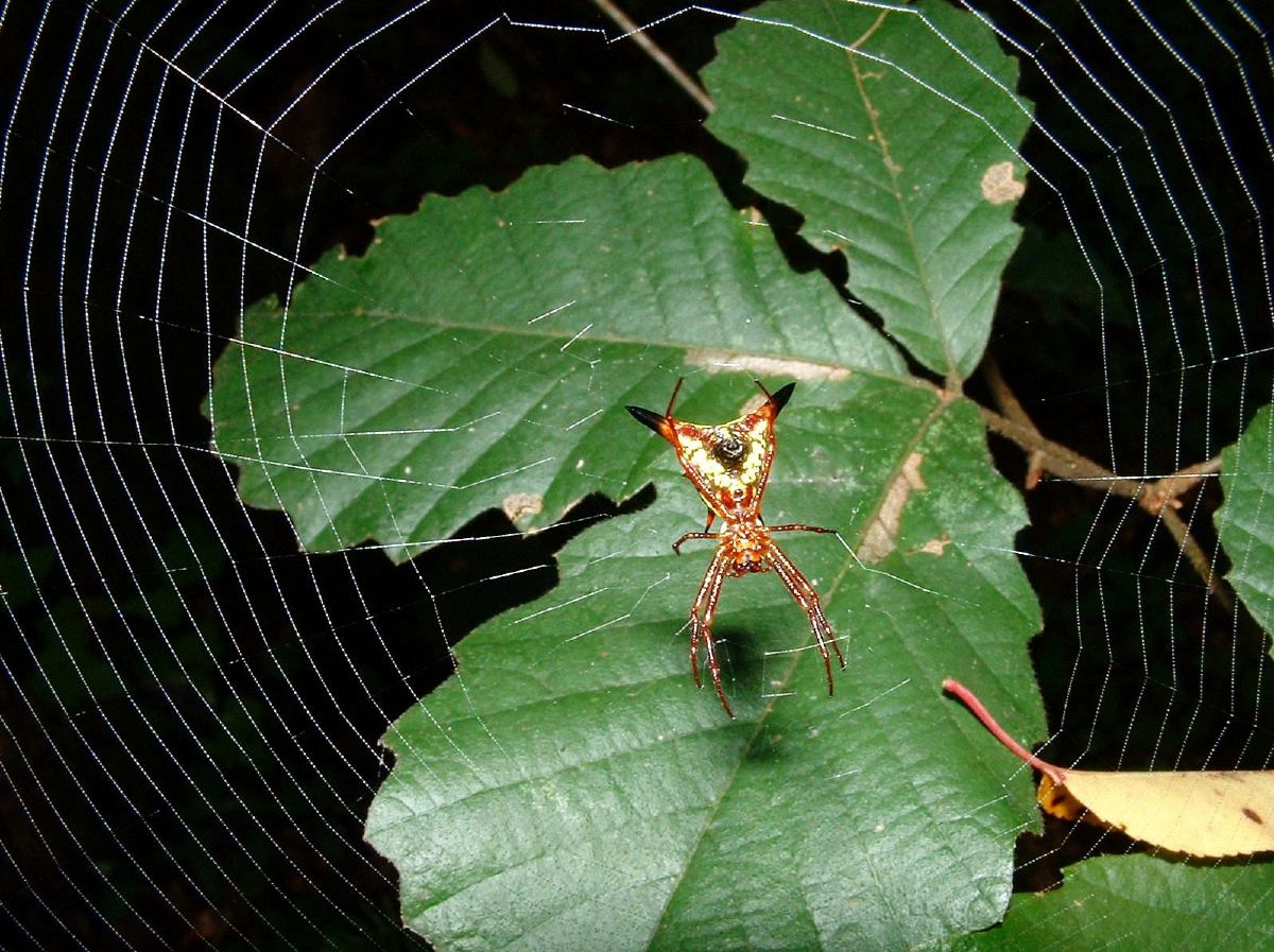 Micrathena sagittata, Gadsden Co. FL USA